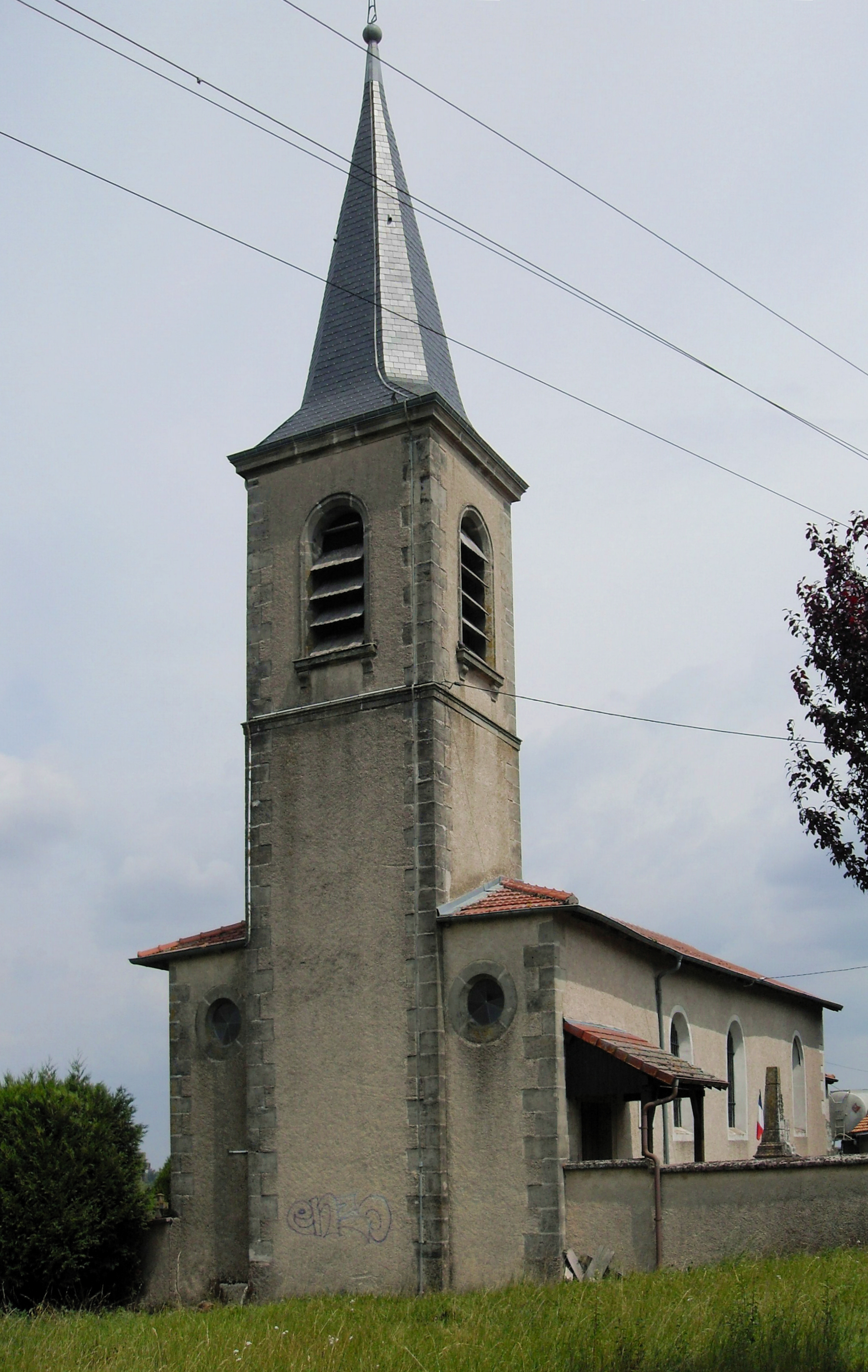 L'église Saint-Martin à Bouzanville